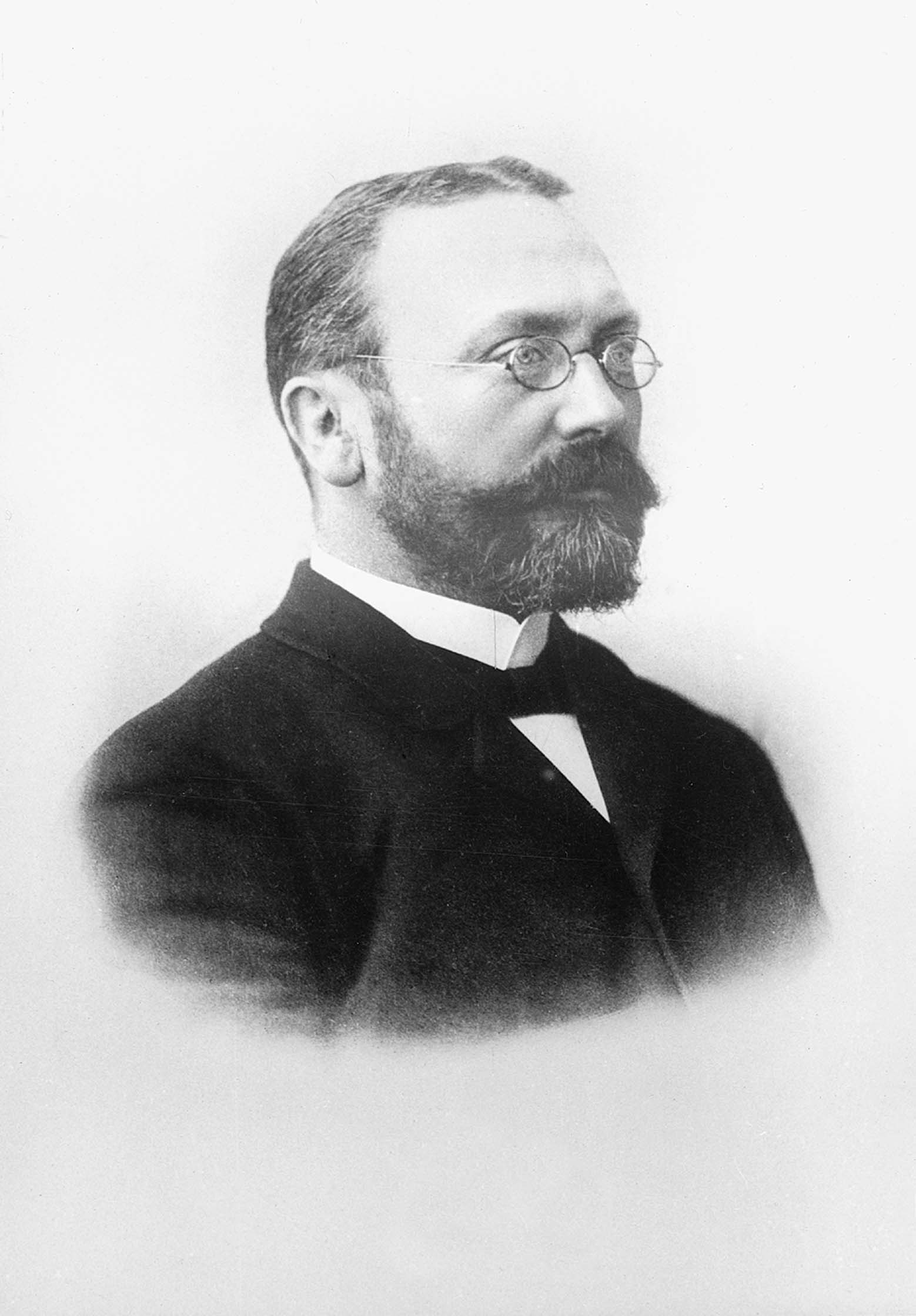 Georg Gaffky (1850-1918), deutscher Arzt und Bakteriologe.